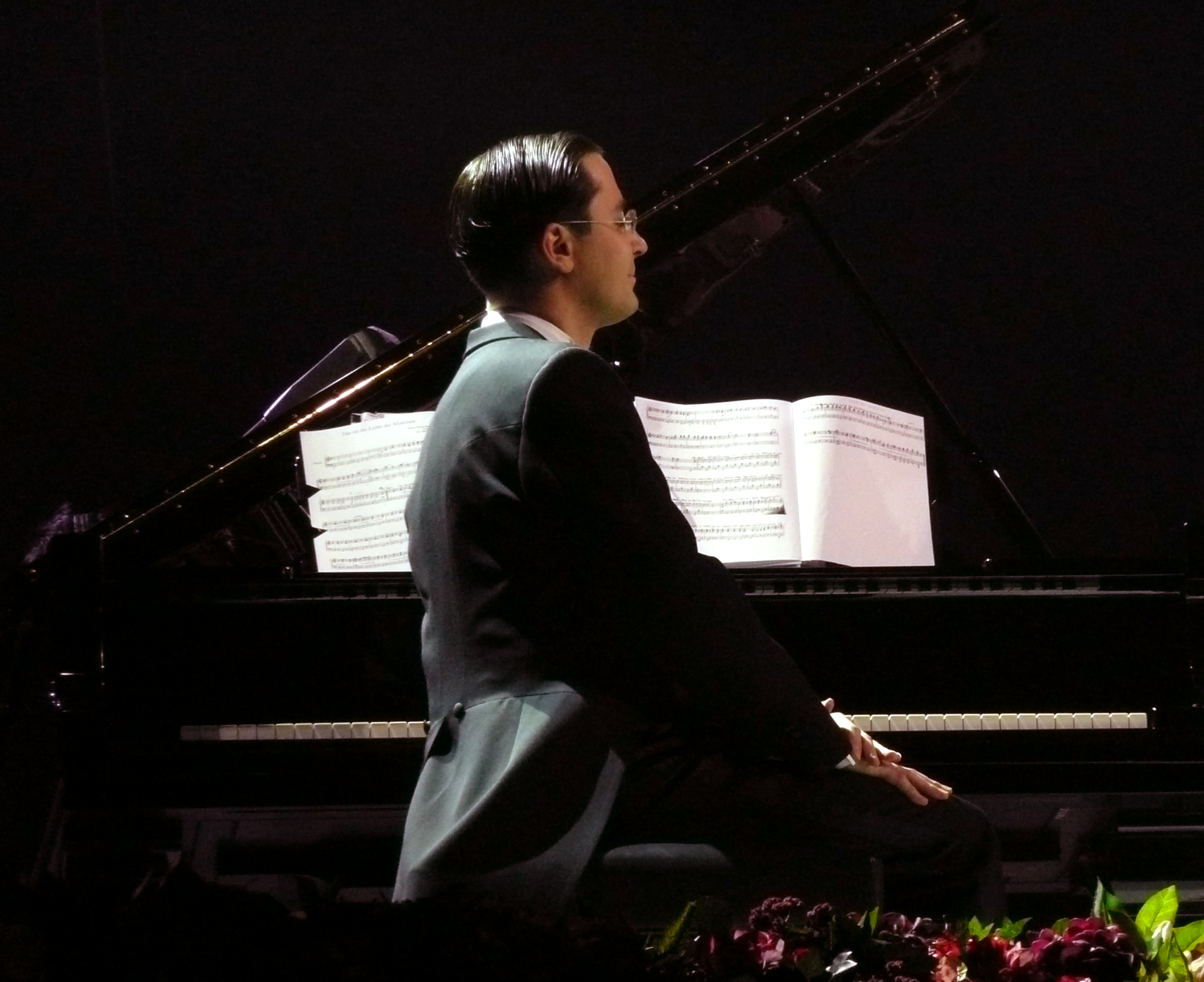 Nikolai Orloff, Gastpianist der Berlin Comedian Harmonists, am 02.01.2010 beim Konzert von Andre Rieu in Köln